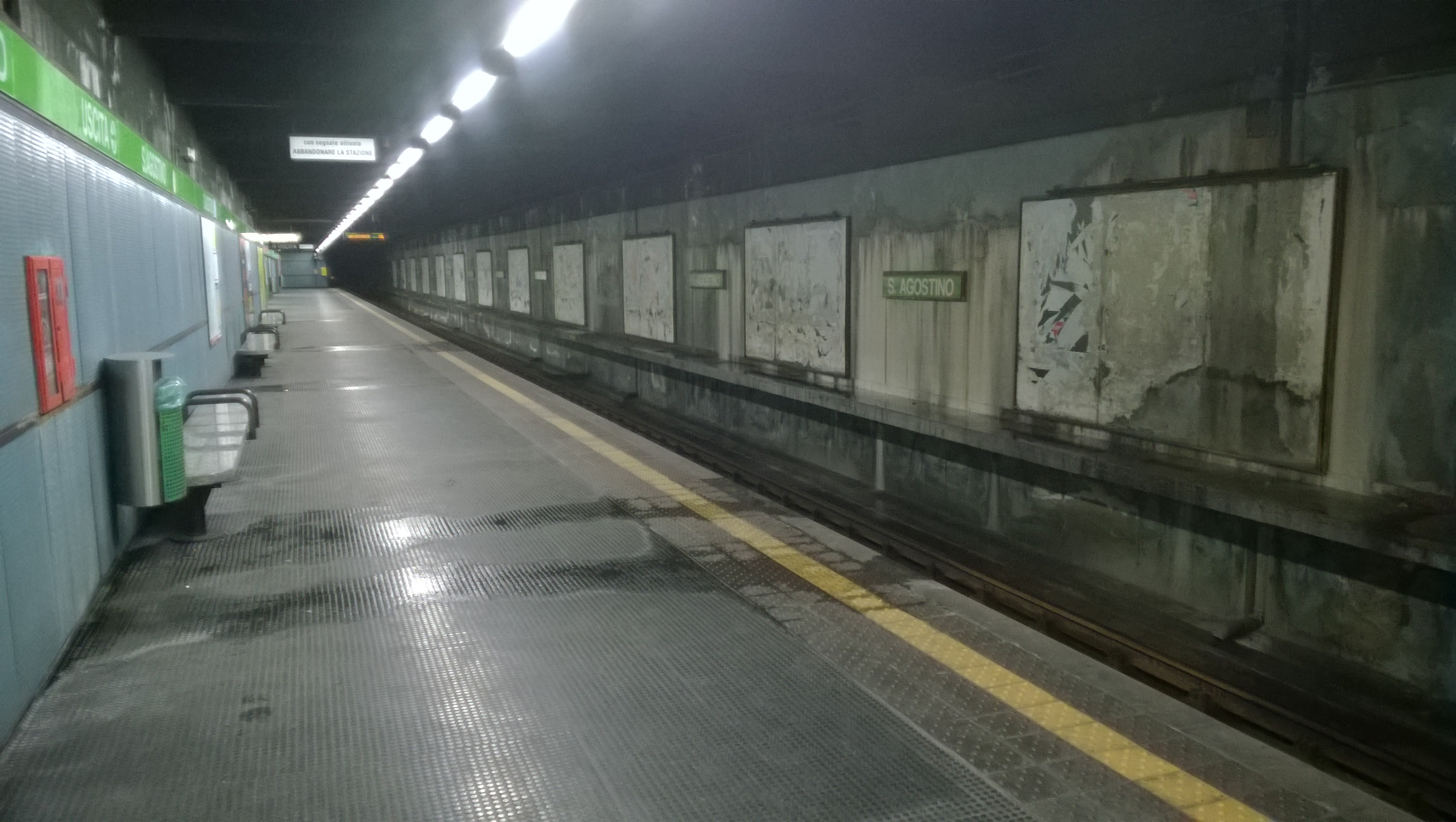 Il livello inferiore della stazione di Sant’Agostino della linea M2 della metropolitana di Milano.